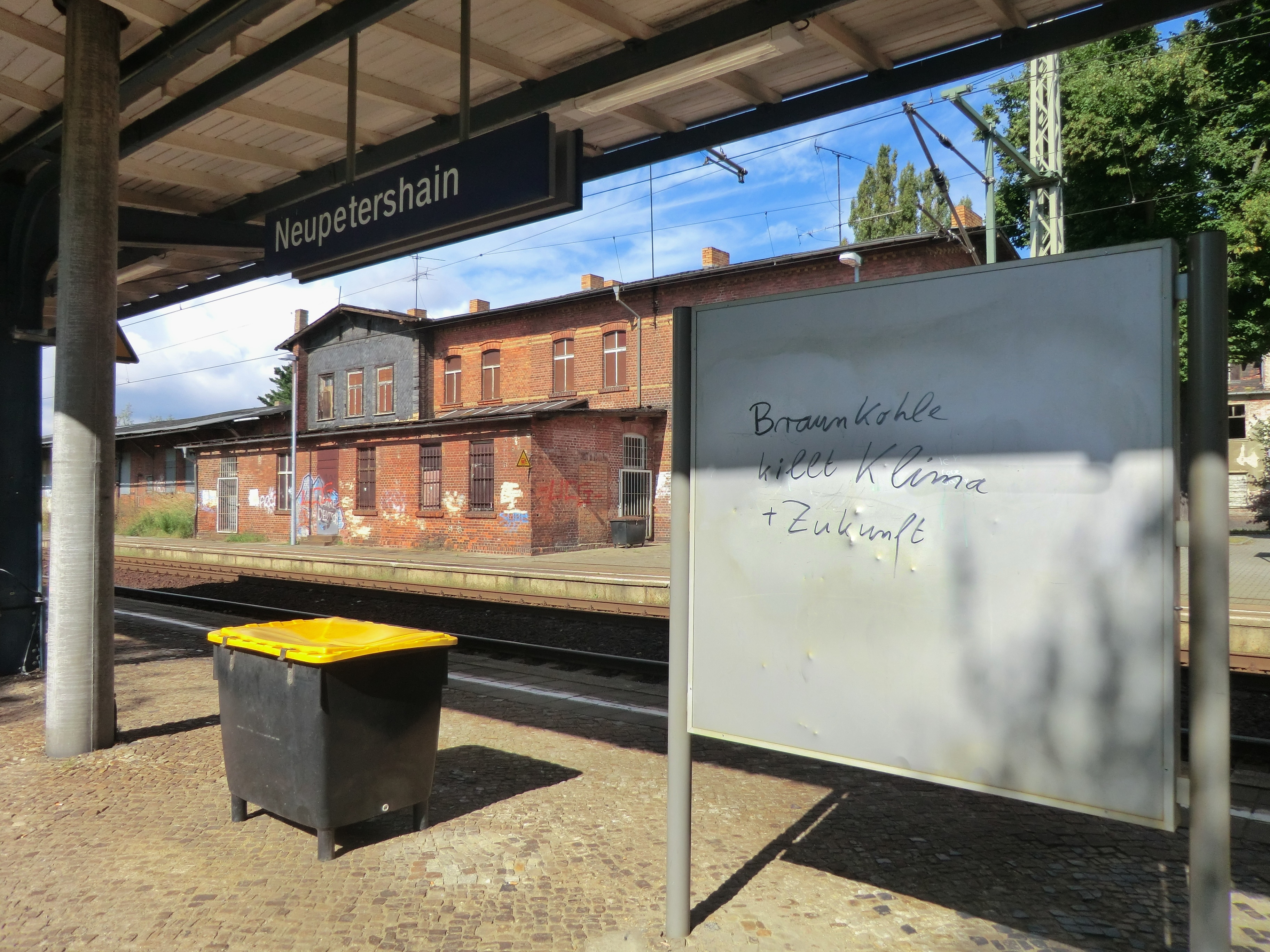 Bahnhof Neupetershain - Braunkohle killt Klima und Zukunft